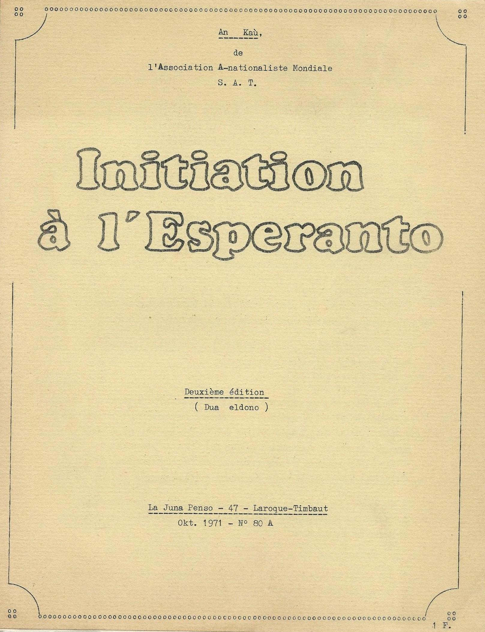 interna librokovrilo de "Karlo", 1971